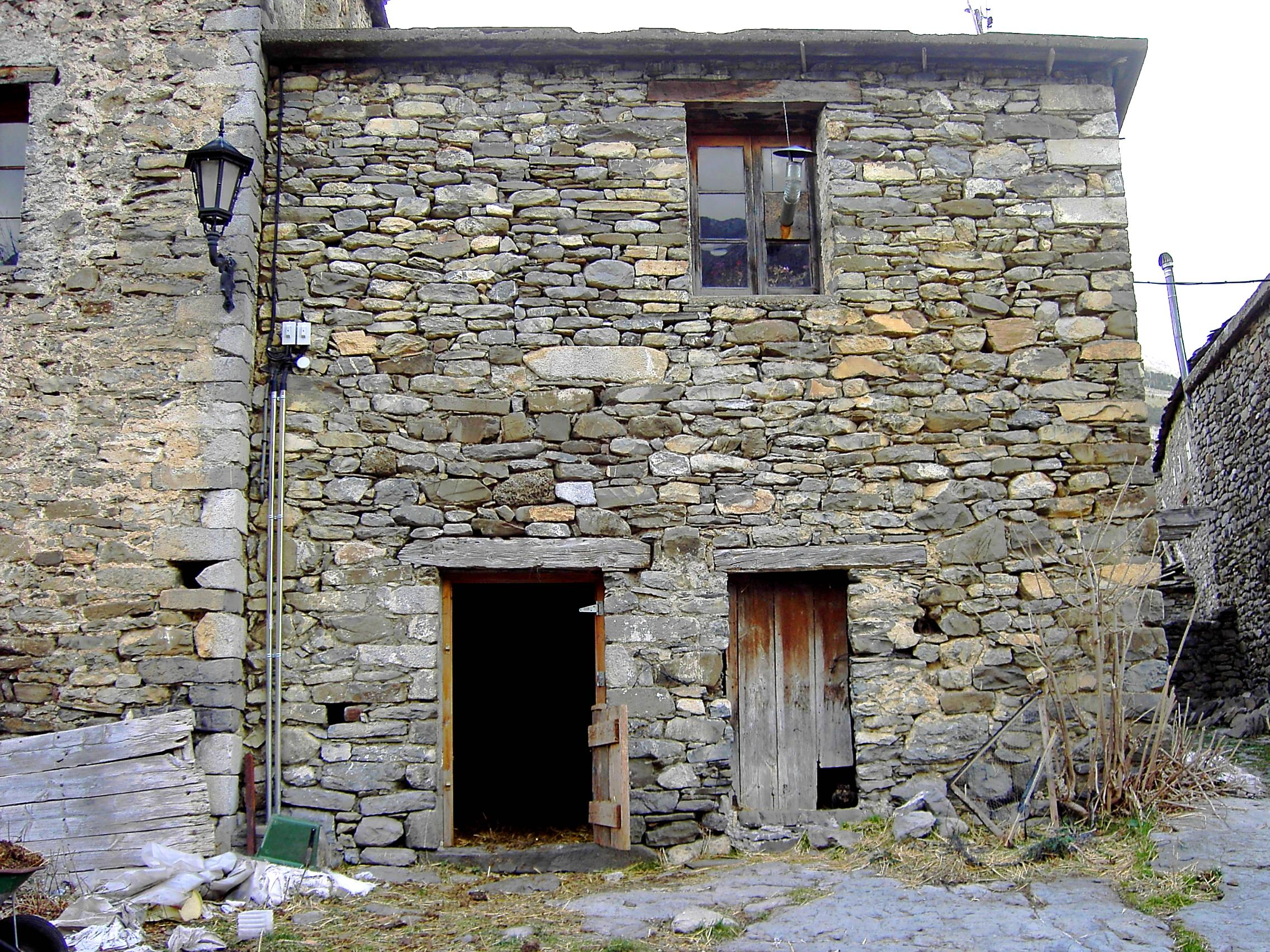 Casa habitada en Escuaín.